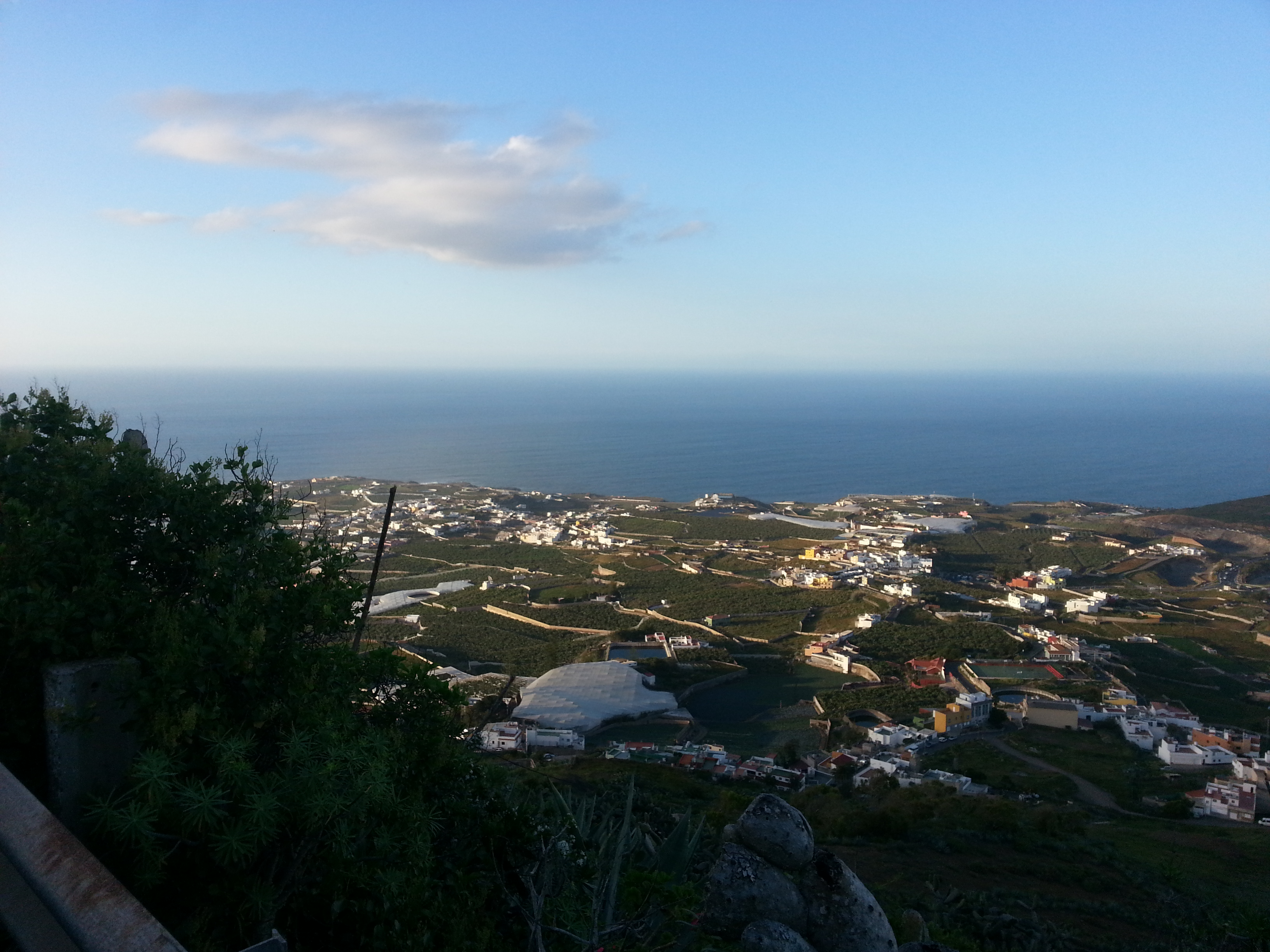 Vista de plantación de plataneras desde la montaña de Arucas.